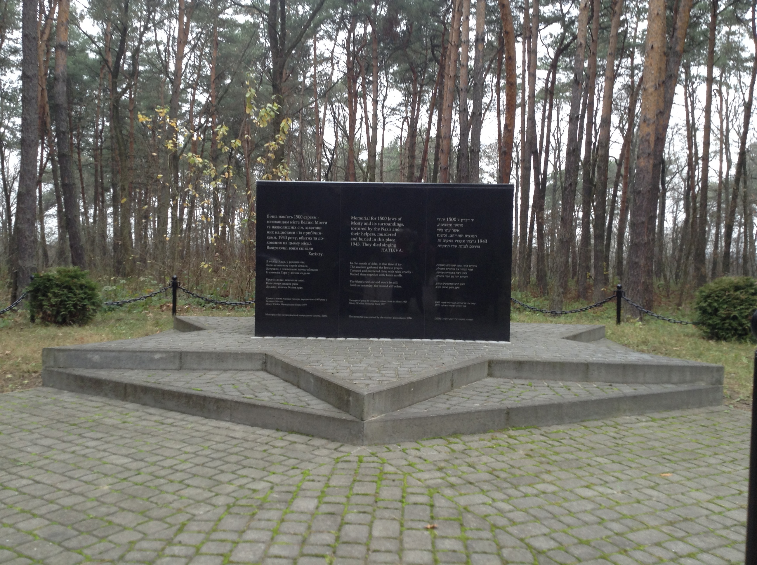 von Jerzy Czarnecki im Jahr 2006 errichtetes Denkmal zum Gedenken an die Ermordung der lokalen jüdischen Bevölkerung während des 2. Weltkriegs